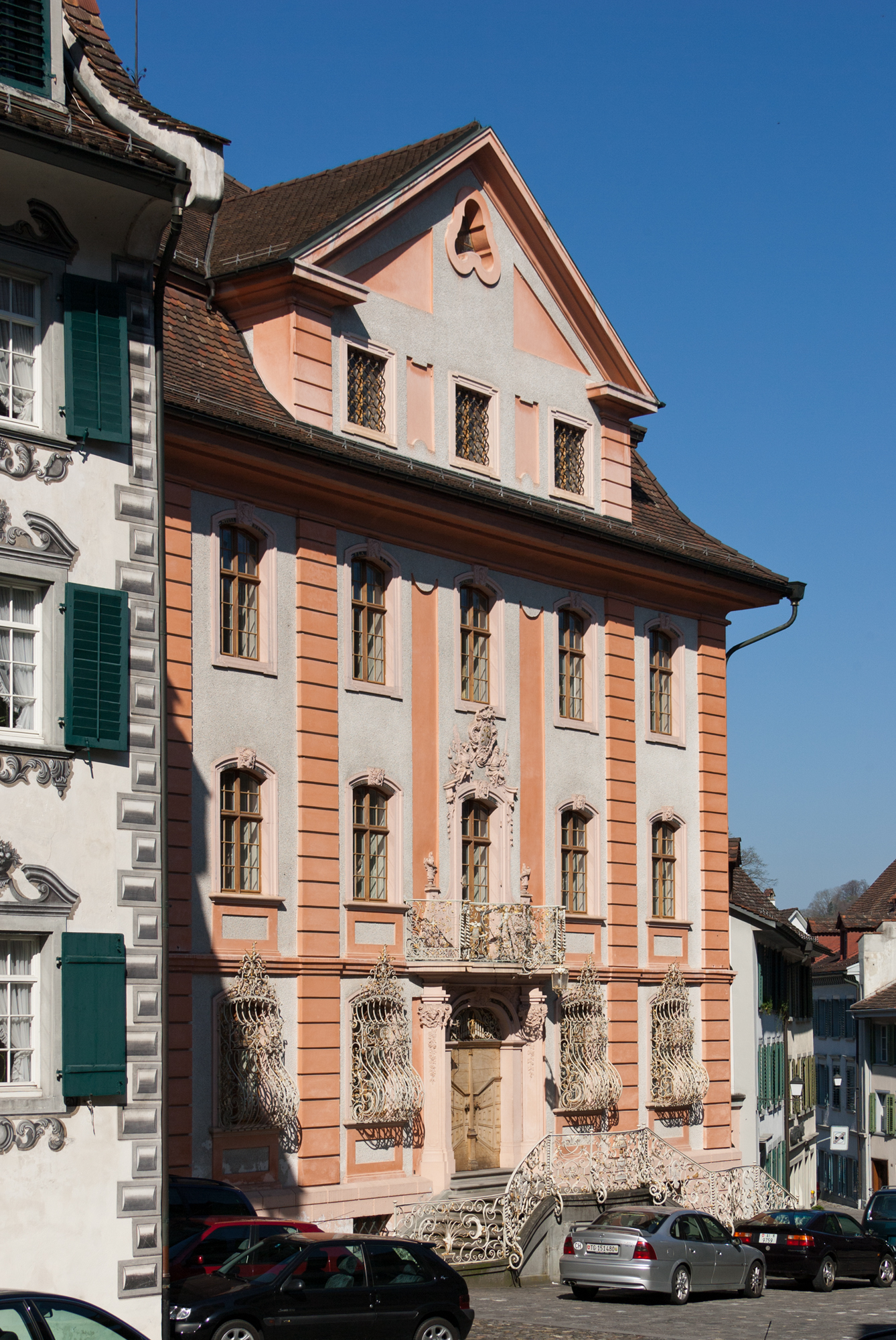 Rathaus an der Marktgasse in Bischofszell